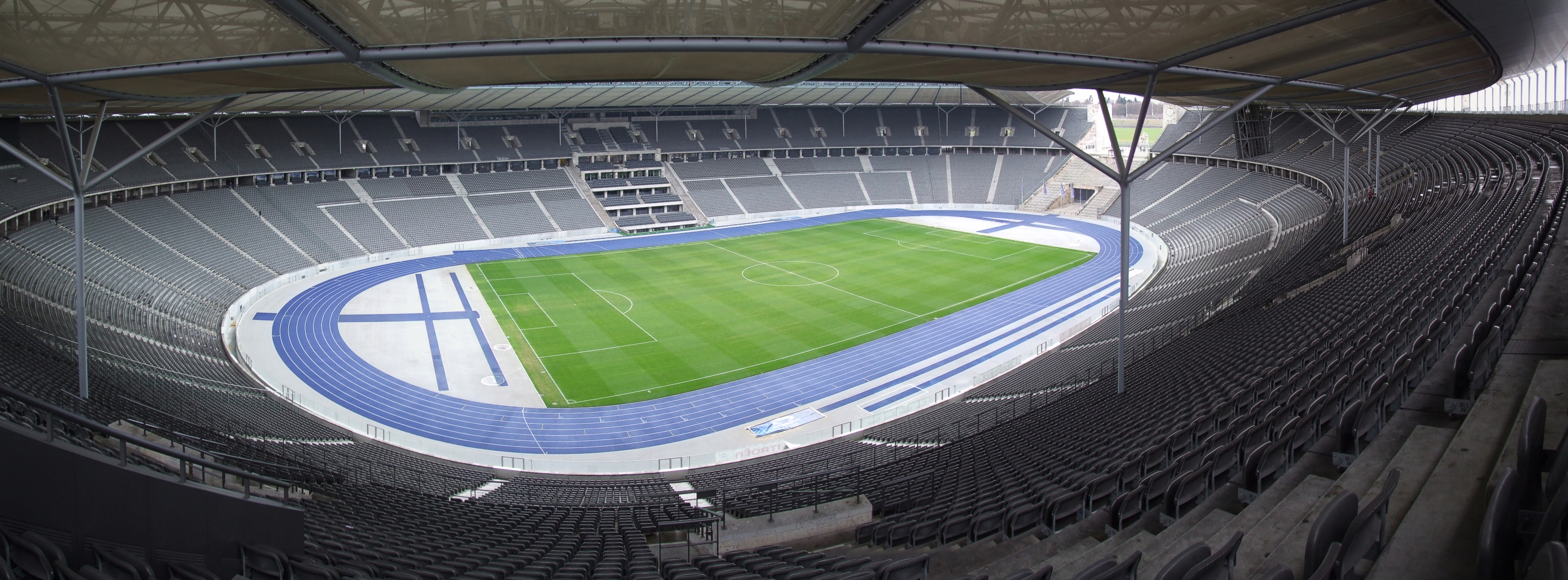 Olympiastadion Berlin